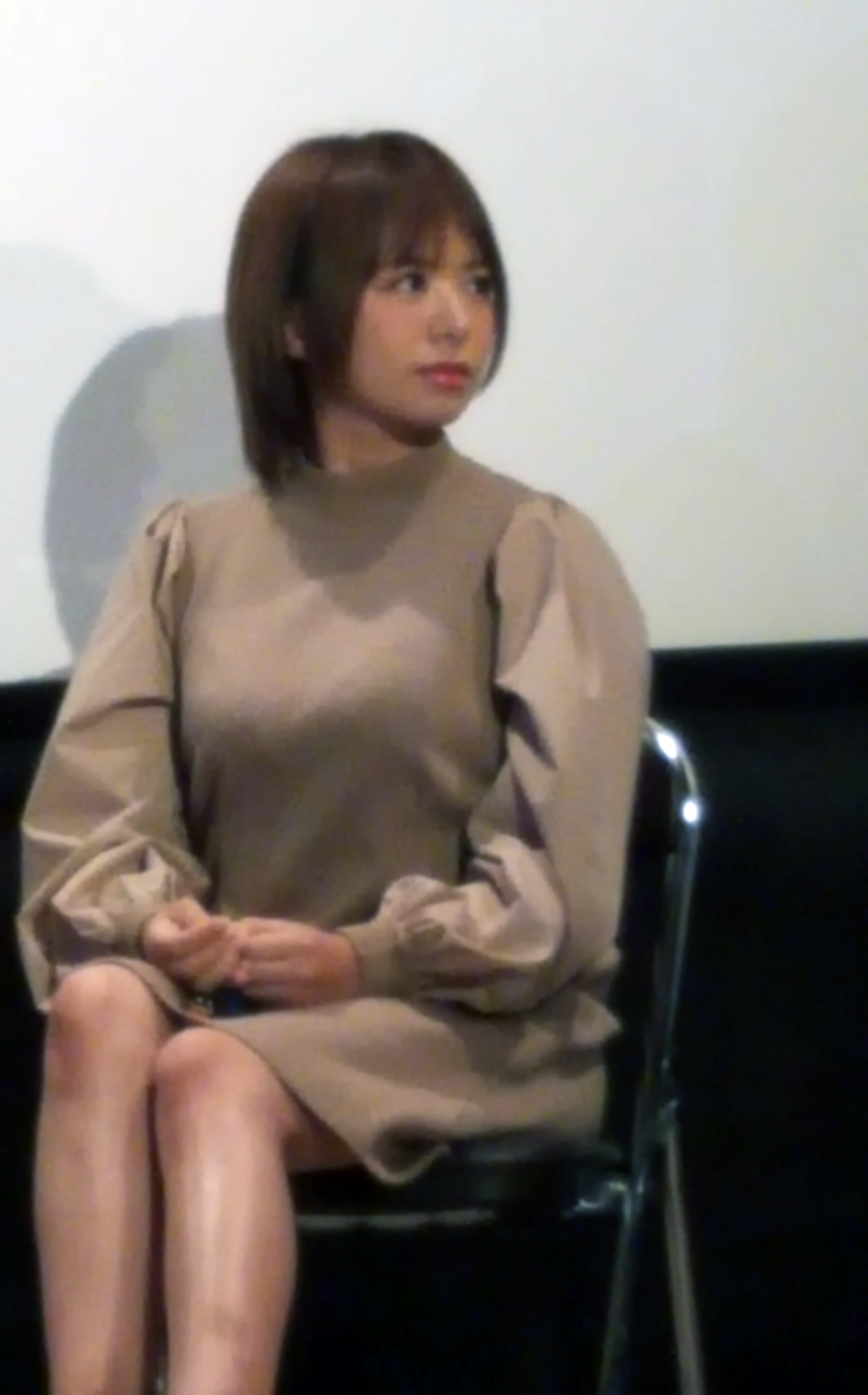 映画「バージン協奏曲 それゆけ純白パンツ!」公開舞台挨拶（2019年）